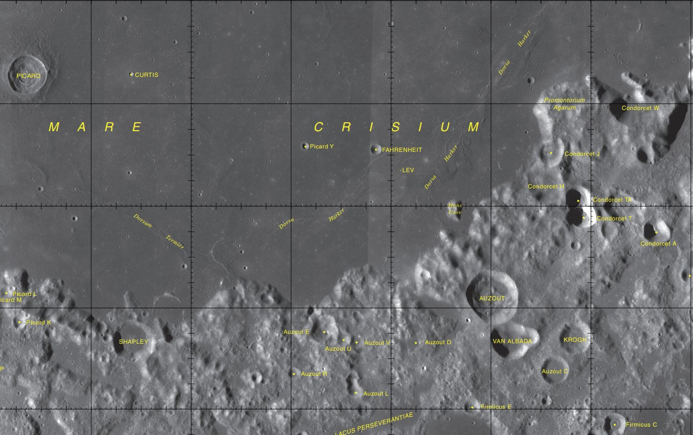 Cráter lunar Fahrenheit. Localización general. (Imagen LRO)